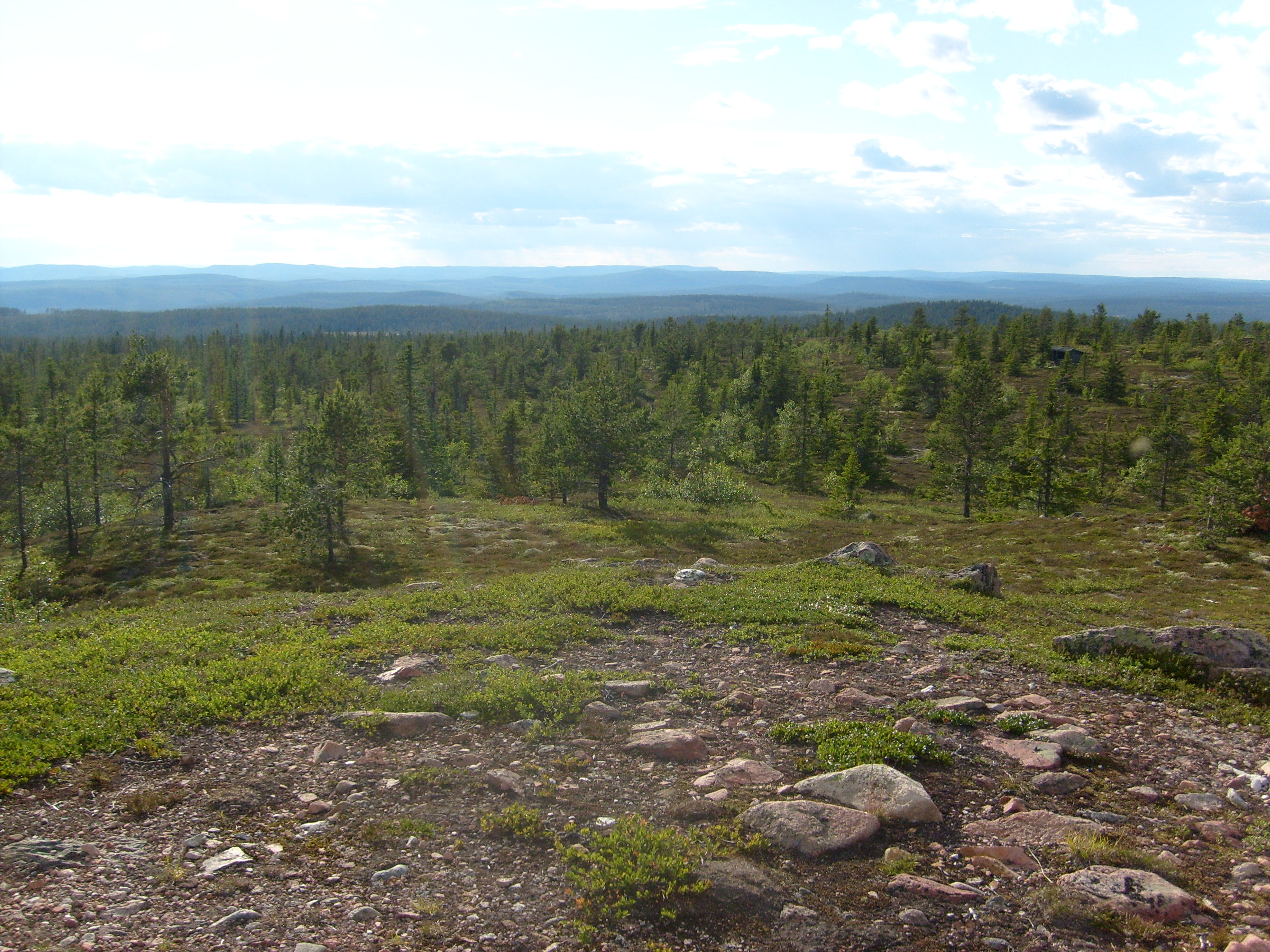 Andljusvarden, Andljusvardens naturreservat